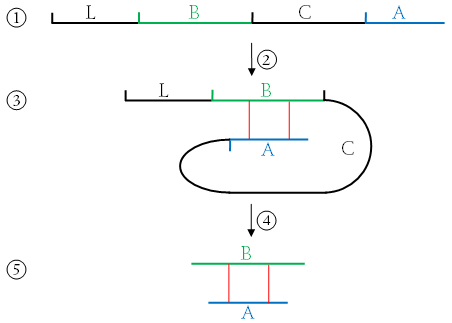 Prozessierung des Präproinsulin zum Insulin.